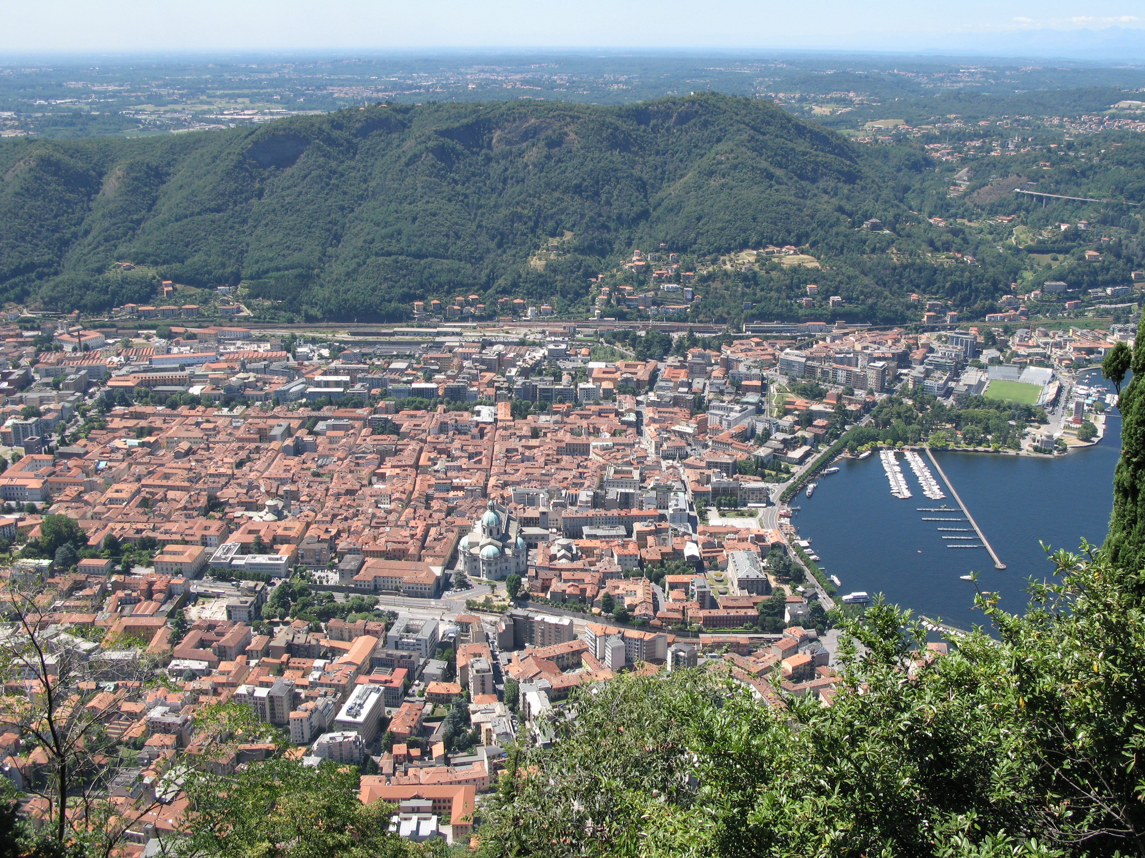 Como panorama from Brunate